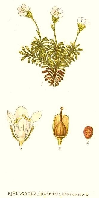 Original Description Fjällgröna, Diapensia lapponica L.